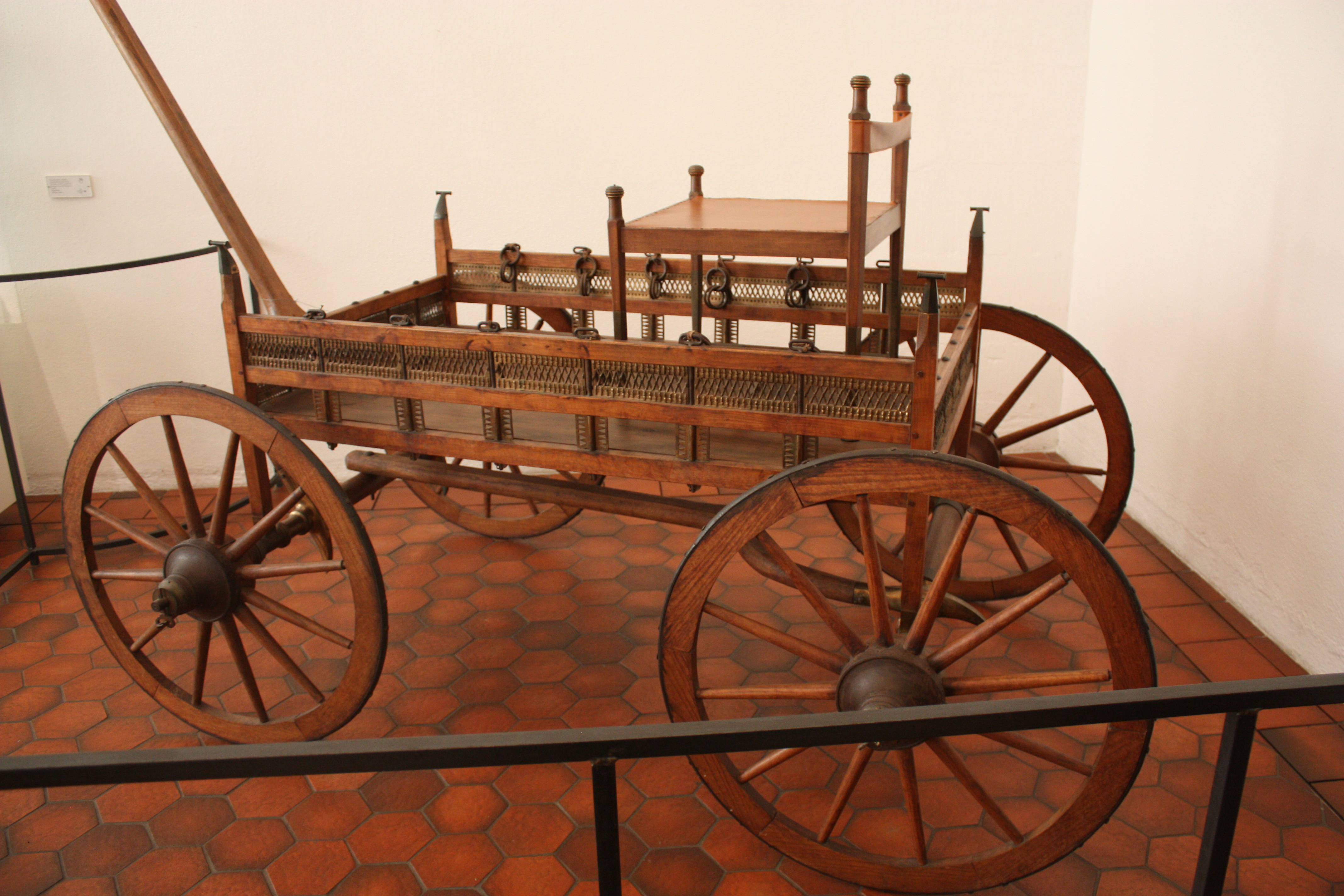 Collections of Musée archéologique de Strasbourg